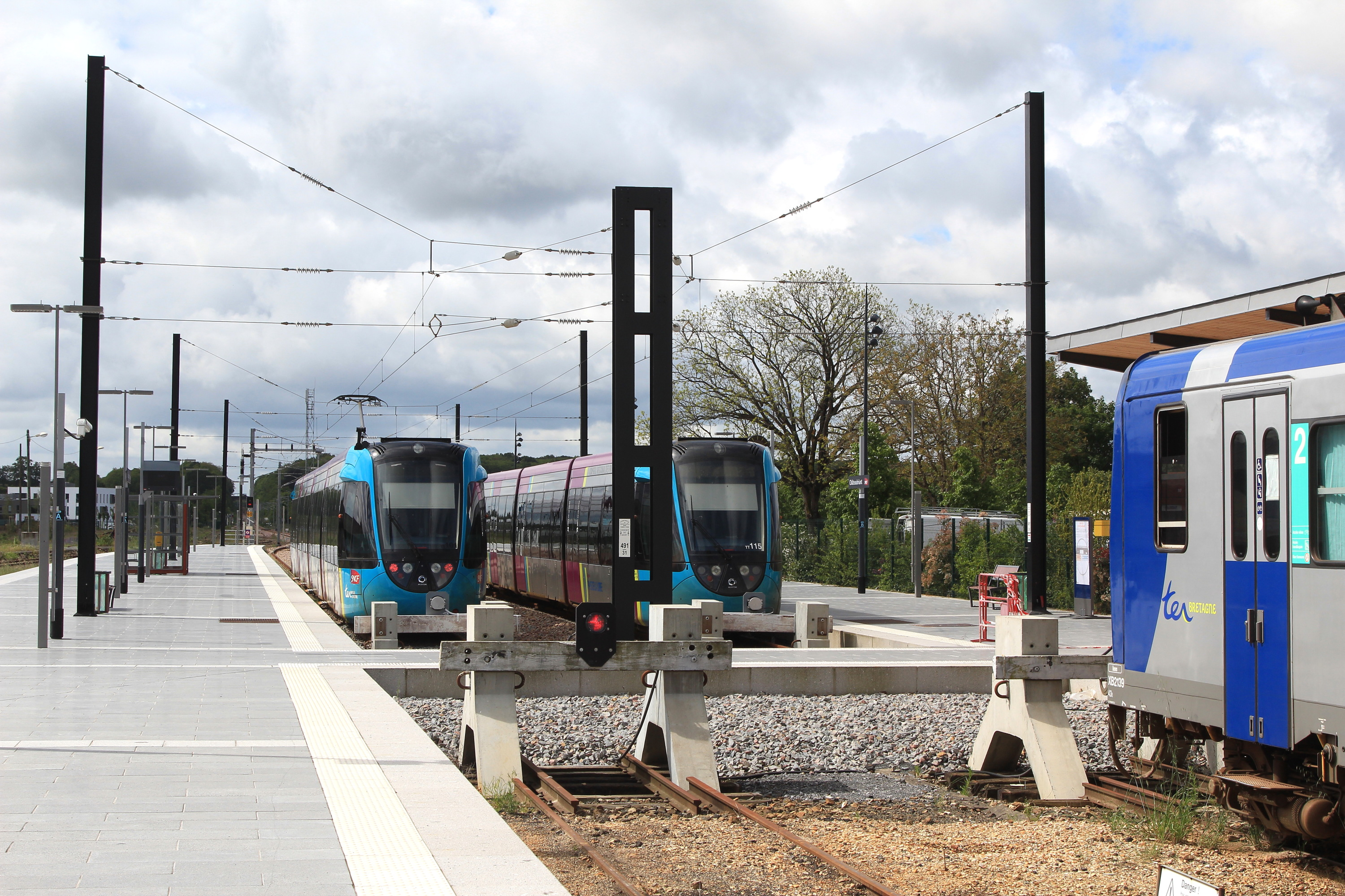 Deux trams-trains ligériens et un TER breton en gare de Châteaubriant.